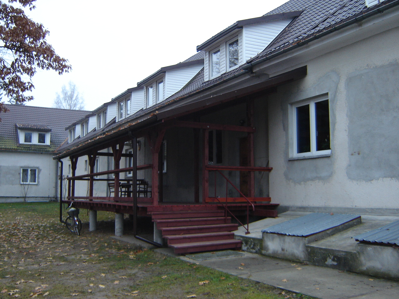 Monaster św. Dymitra w Sakach. Wejście do cerkwi monasterskiej.